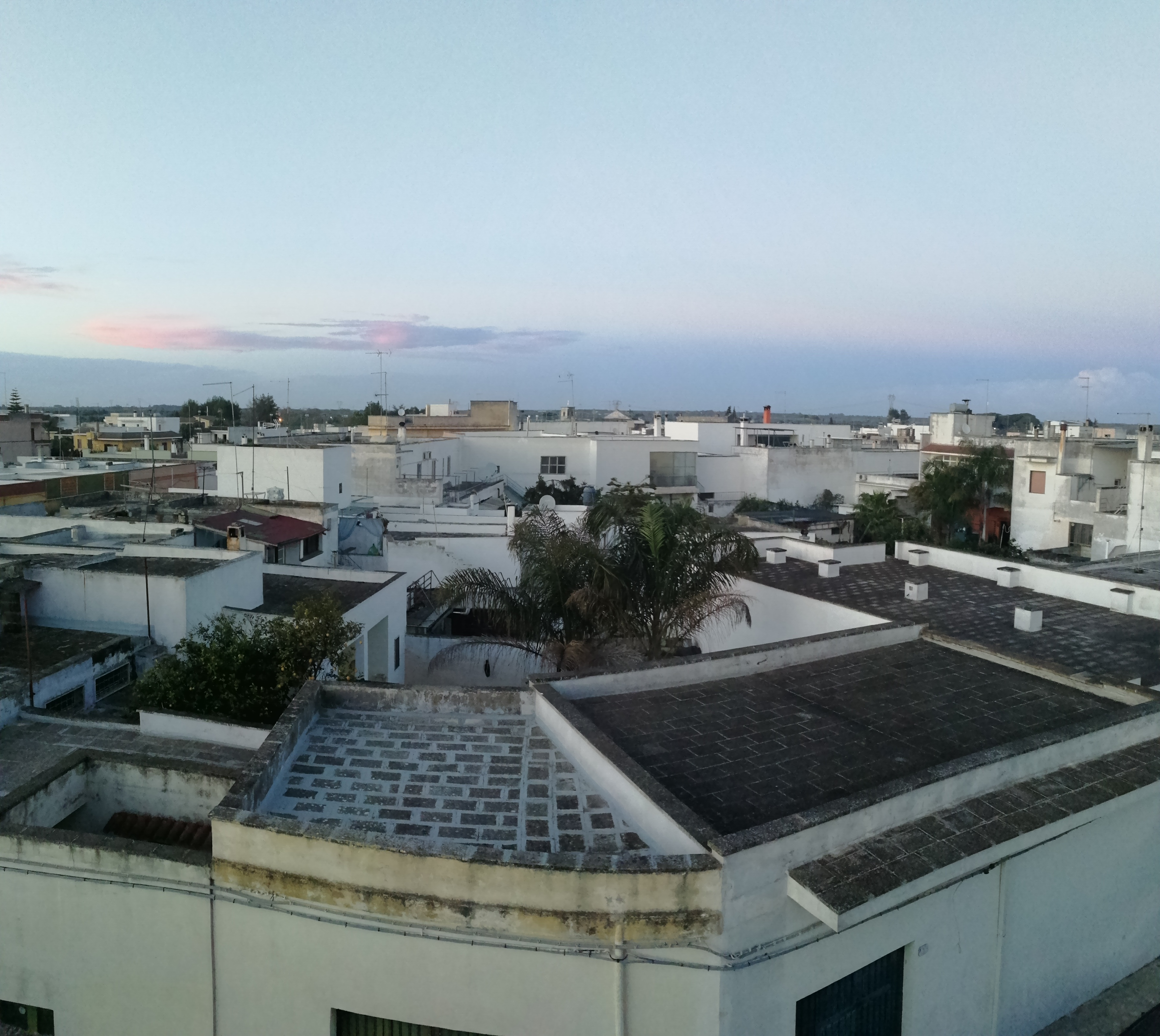 vista dall'alto